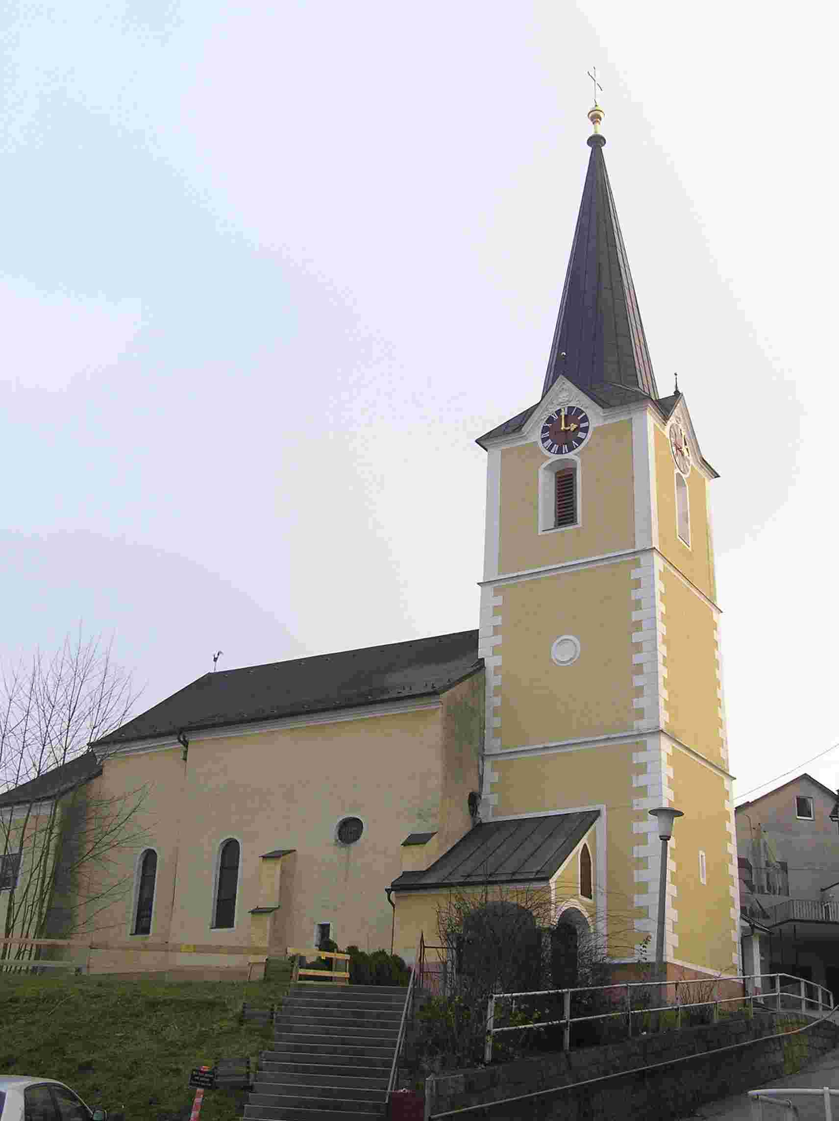 Pfarrkirche A-4713 Gallspach selbst fotografiert am 10.12.2004 durch Dr. Wolfgang Perr